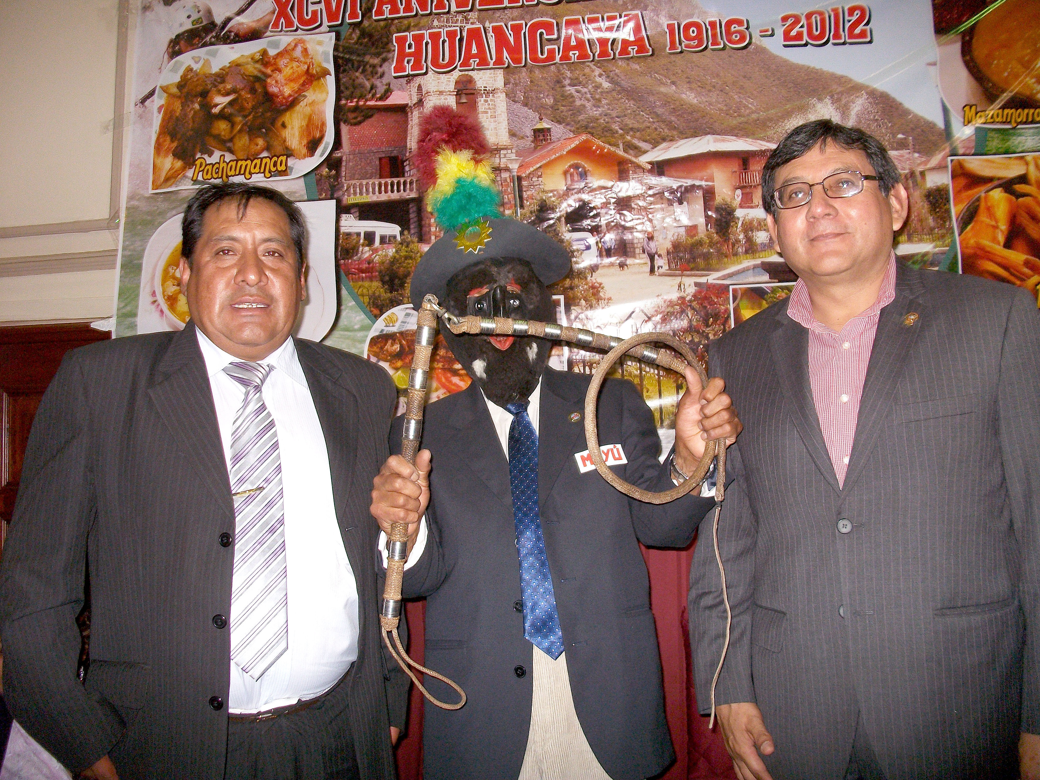 En conferencia de prensa en la sala Mohme del Palacio Legislativo el congresista Angel Neyra Olaychea y el alcalde de Huancaya, en la provincia limeña de Yauyos, Isaías Ravichagua Bejarano, informan sobre las actividades alusivas al 96° aniversario de la creación política de esa localidad.